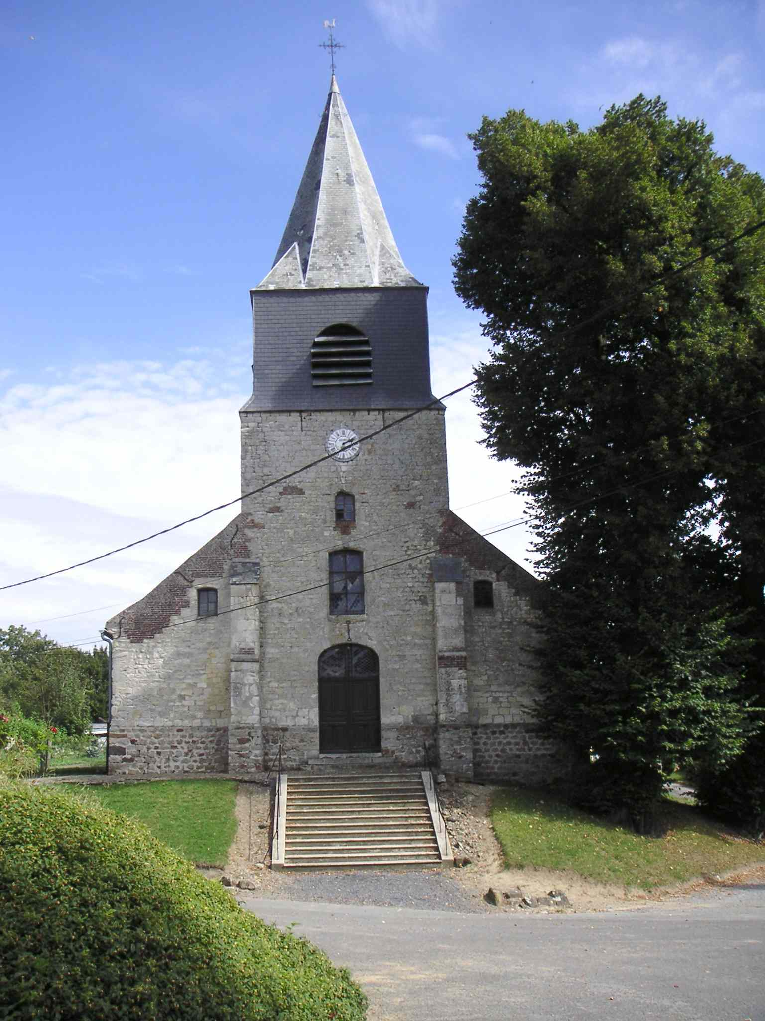 église de Puisieux (Commune de Puisieux-et-Clanlieu, Aisne, France) prise par user:LonganimE le 09/09/2005